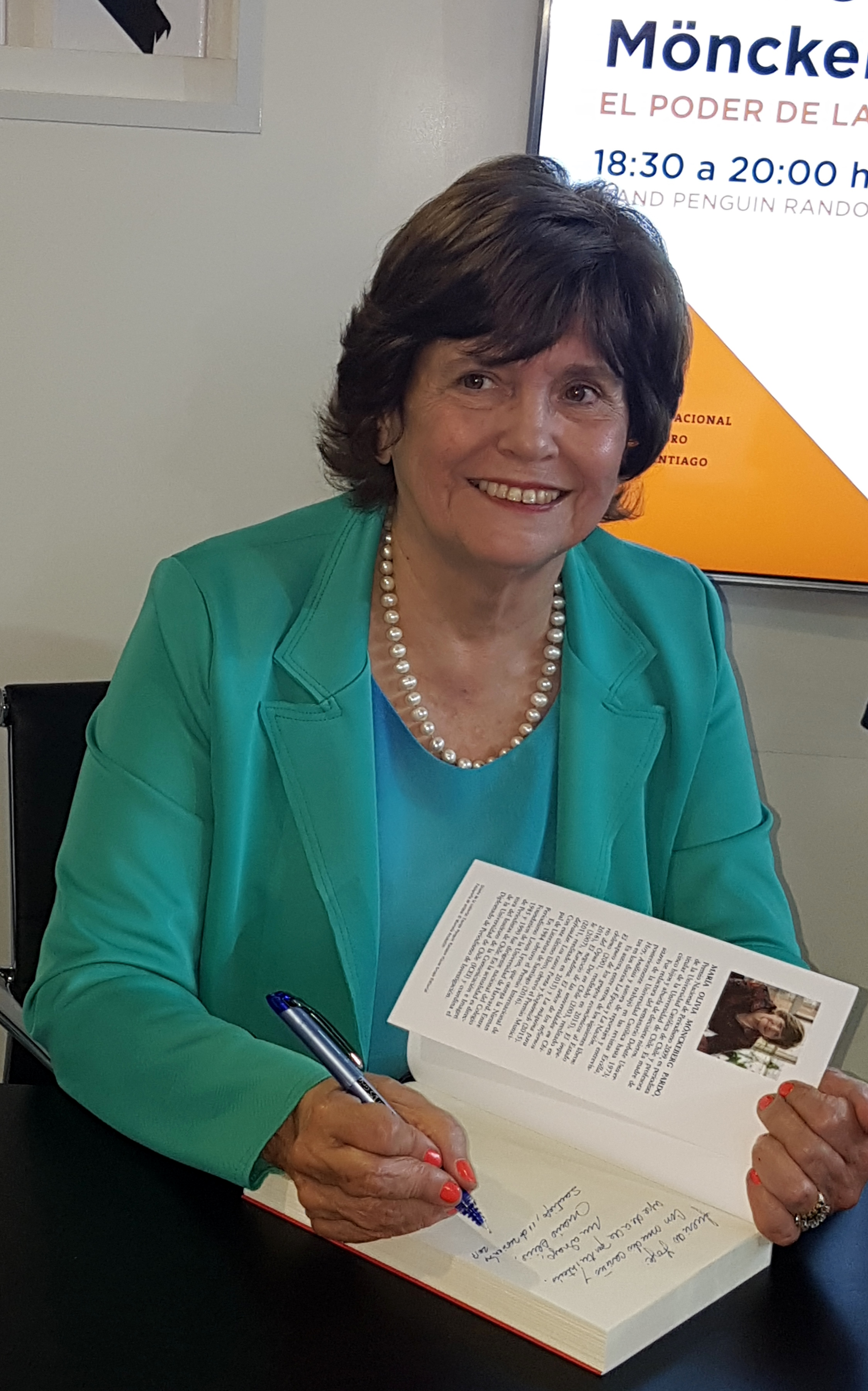 La periodista chilena María Olivia Mönckeberg en la Feria Internacional del Libro de Santiago 2017.